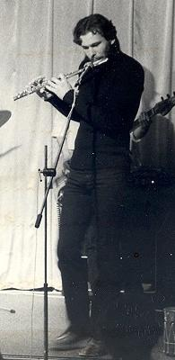 L. Menyhért László (fuvola) a Madame Petuhova búcsúkoncertjén 1985-ben, Szolnokon.